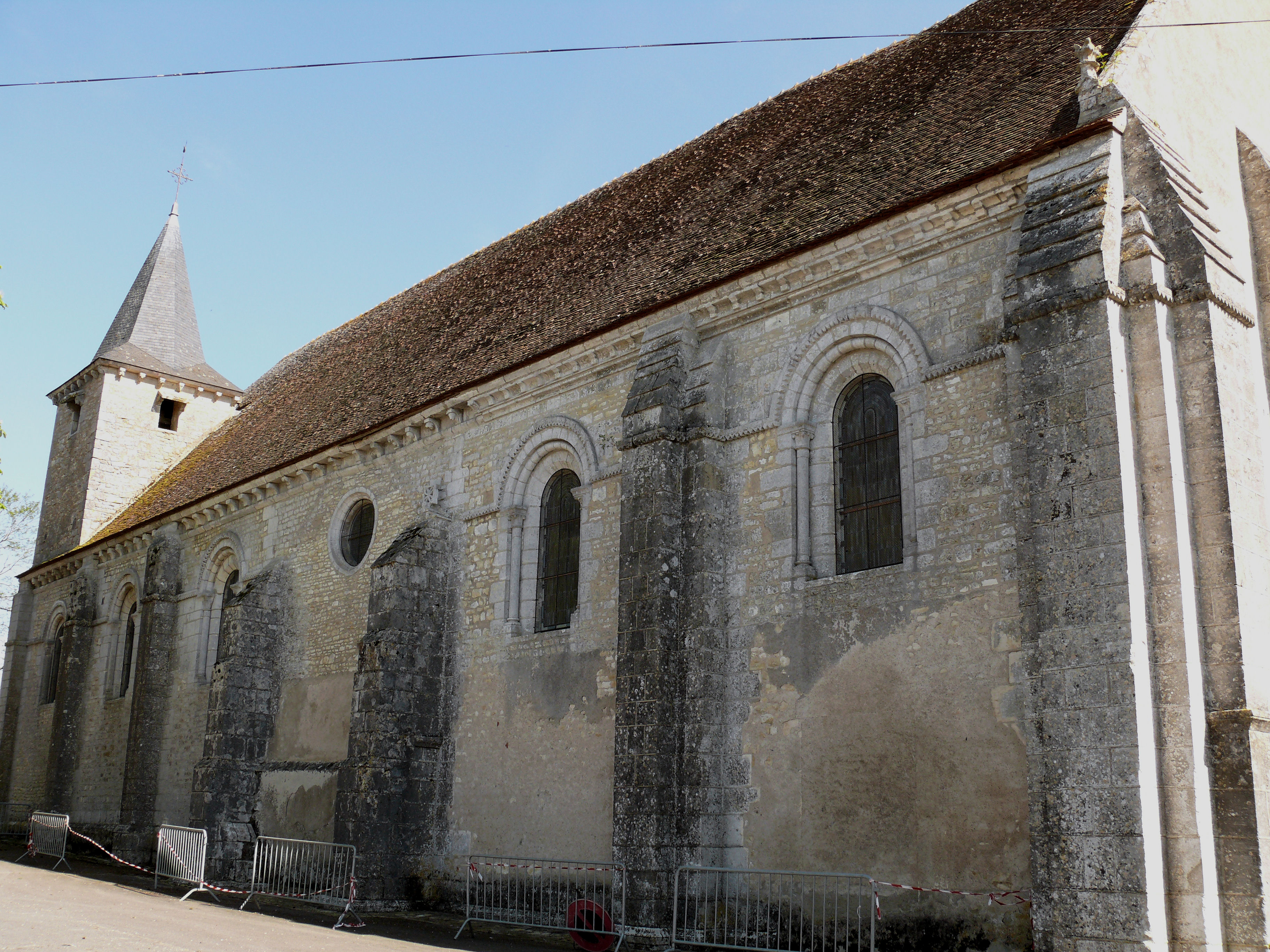 Chezal-Benoît - Abbatiale - Extérieur de la nef